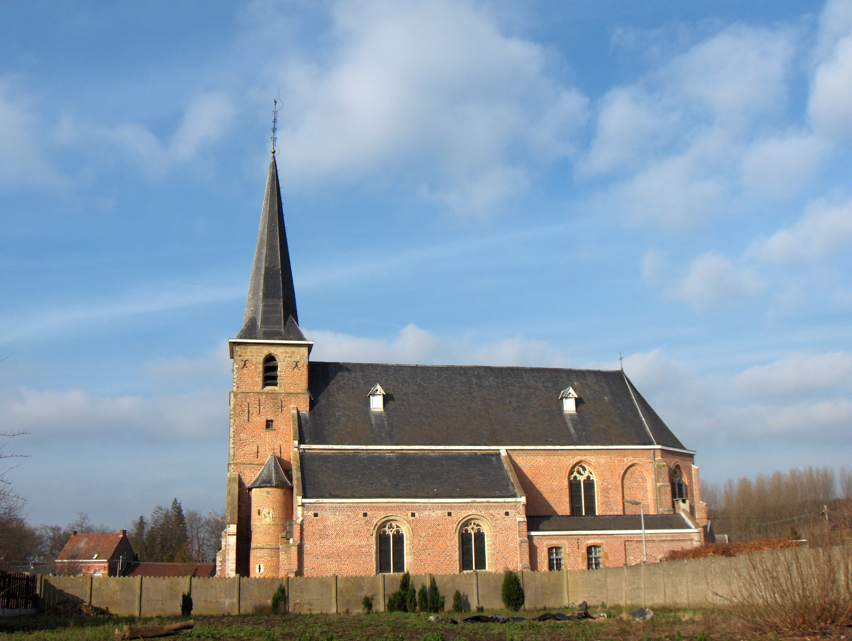 Neigem, Ortsteil der Gemeinde Ninove (Belgien, Prov. Ostflandern), Margarethakirche.